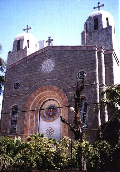 Igreja Nossa Senhora do Libano, Fortaleza, Ceará, Brasil